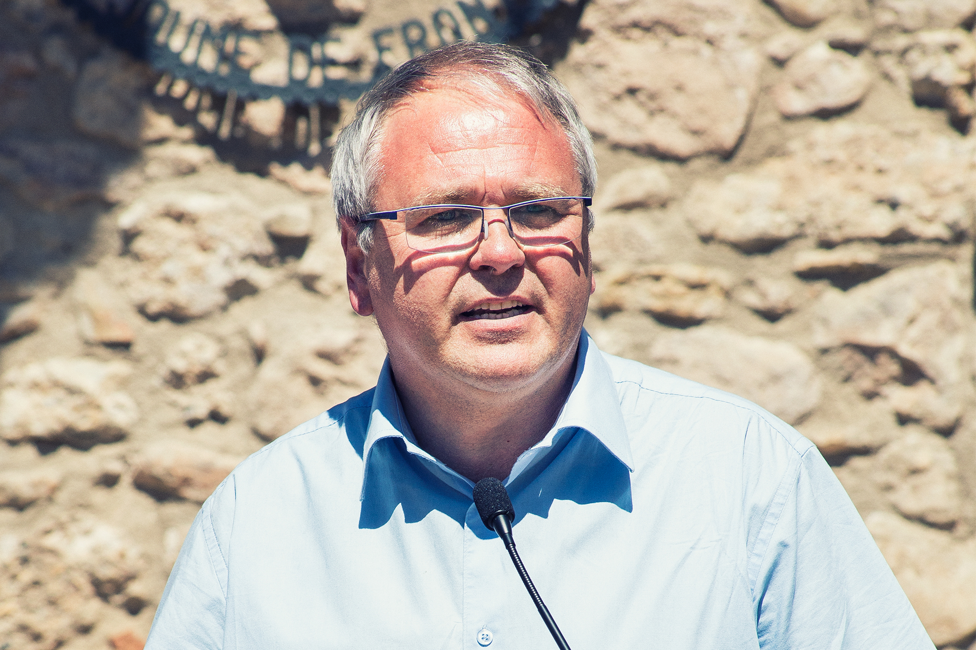 Sant Jaume de Frontanyà 21/05/2016 Foto: Marc Lozano